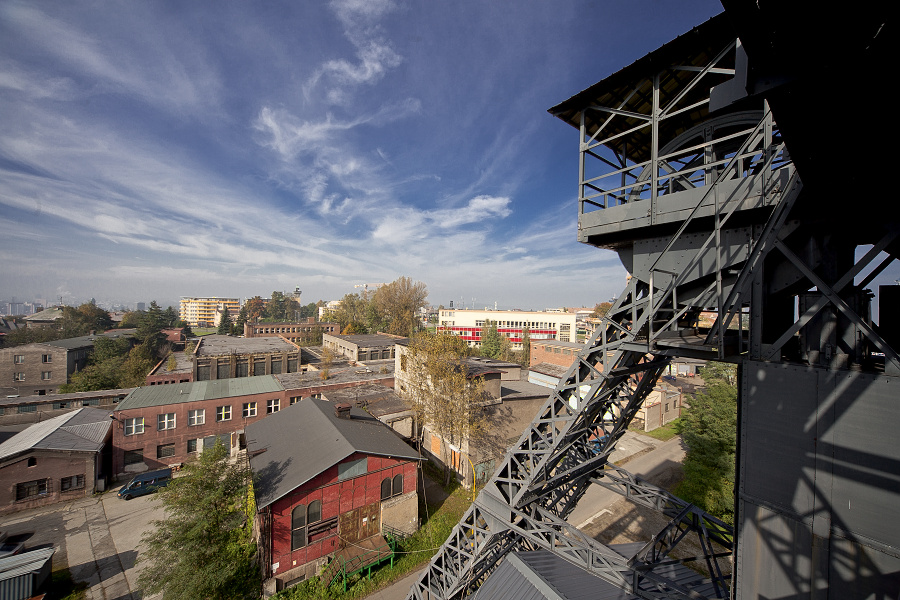 Důl Petr Bezruč - Ostrava Slezská